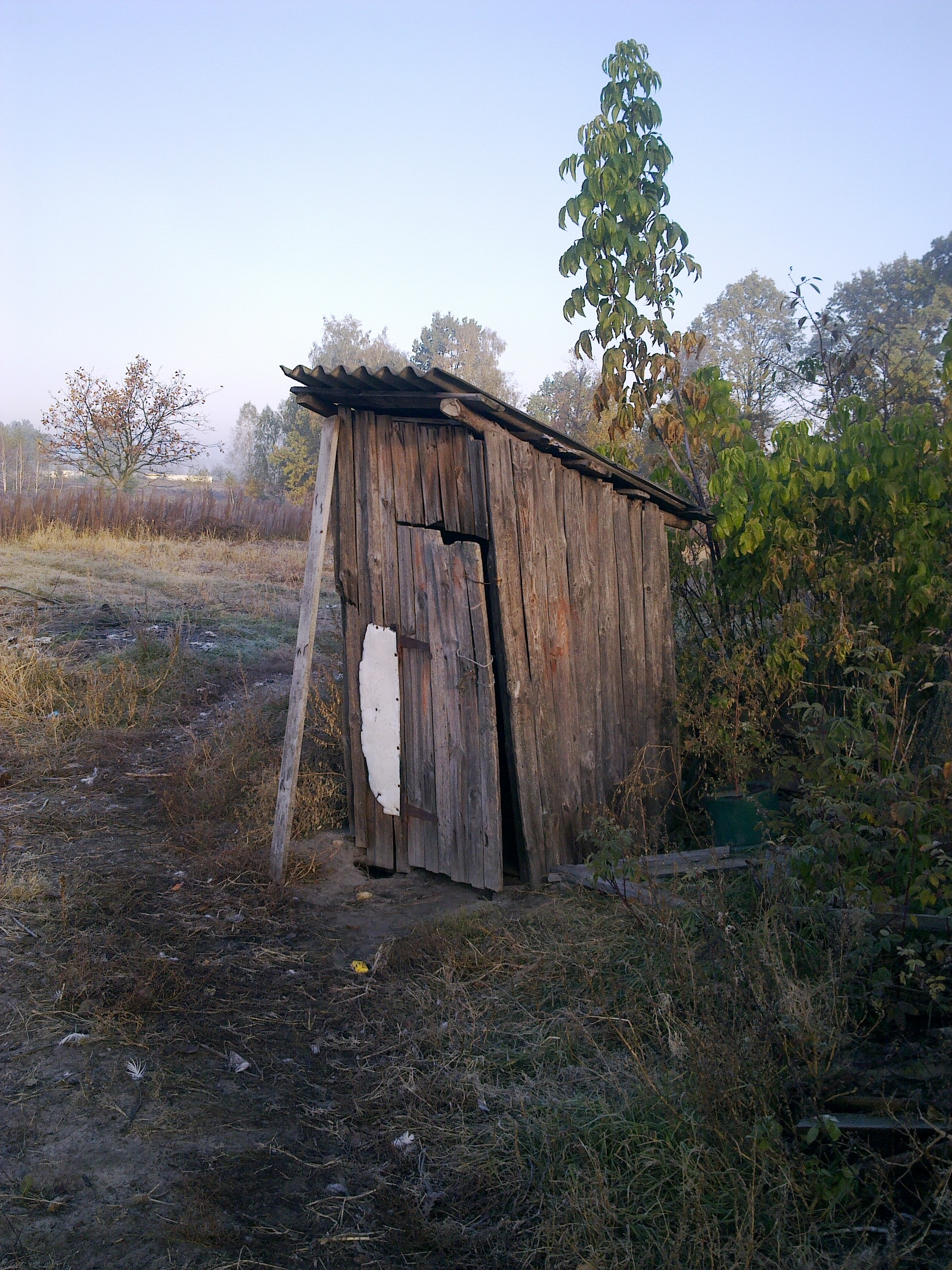 Ländliches WC (Pumbsklo) auf dem ukrainischen Hof Tymkiv.